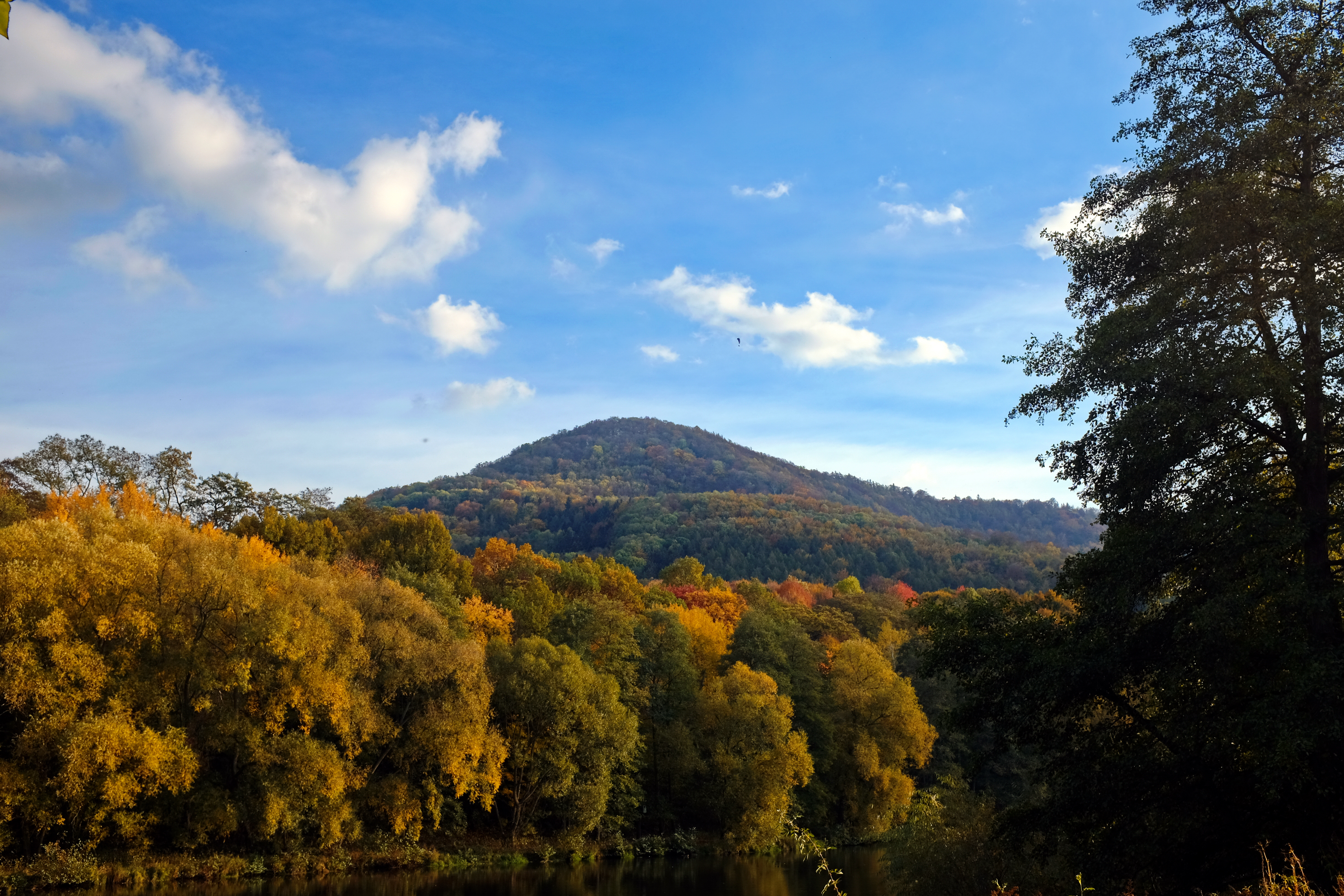 Vrch Mravenčák (531 m), pohled od Ohře, Doupovské hory